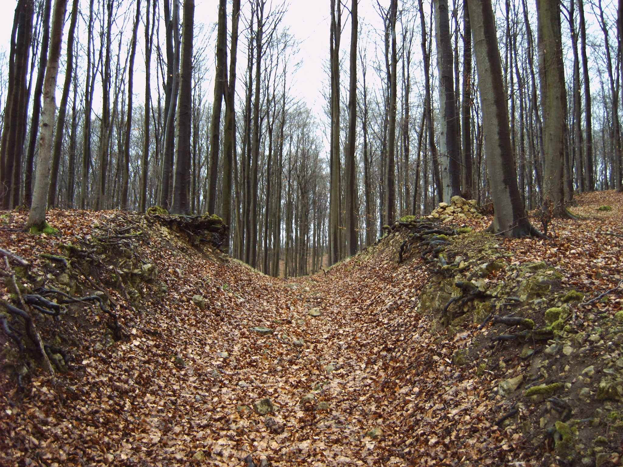 Hohlweg am Ducksteinberg im Solling-Vogler